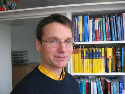 Foto di Stefan Sauter